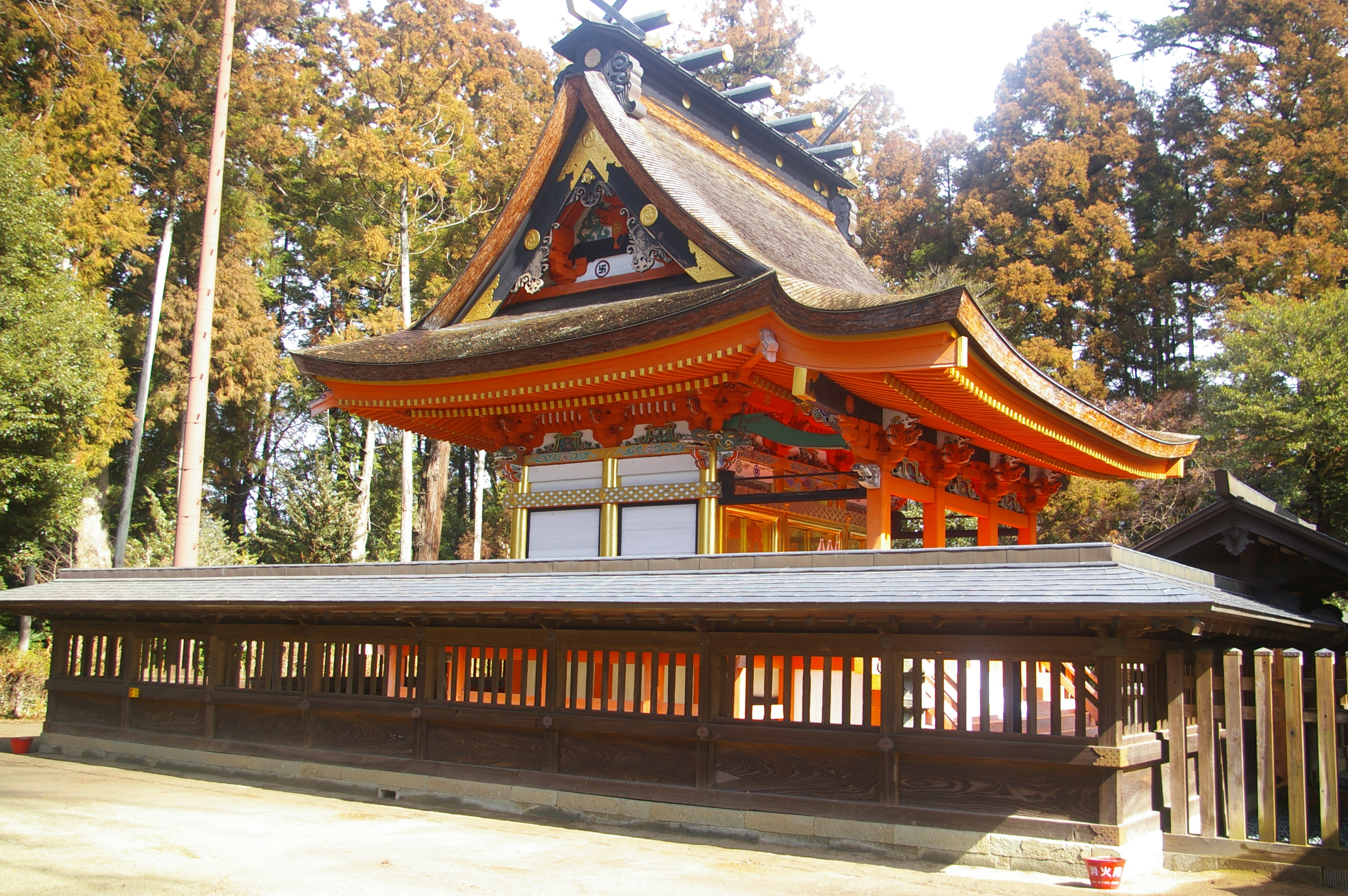 水戸八幡宮本殿(国指定重要文化財)